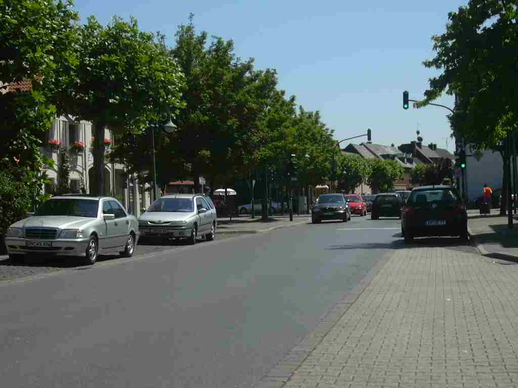 Kreuzau Ortsmitte Own Work papa1234 2006-07-14